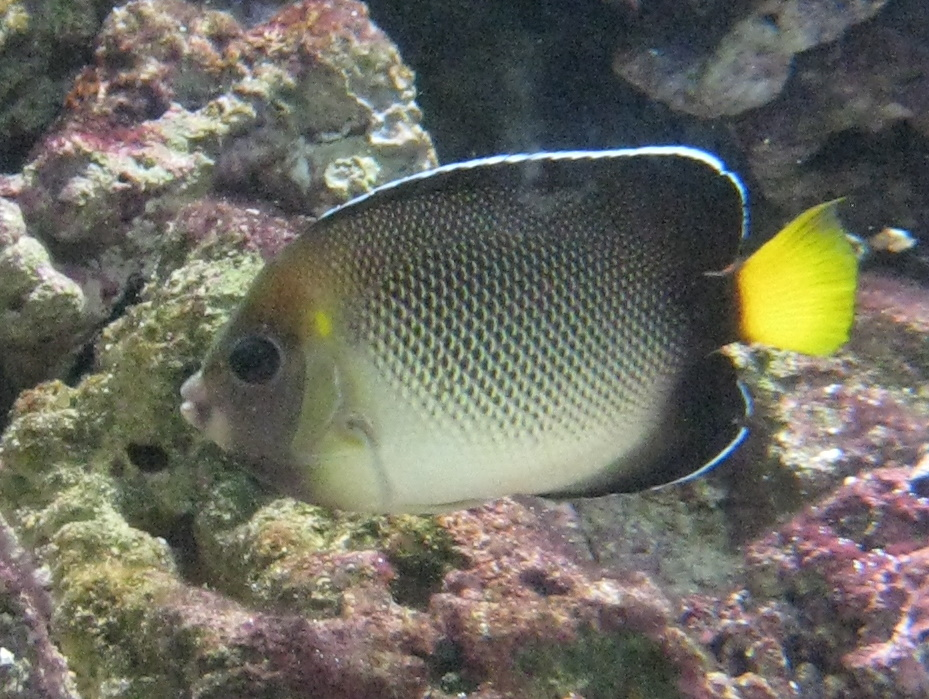 Apolemichthys xanthurus à l'aquarium Cinéaqua